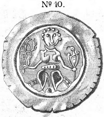 Brakteat Dohna, Kupferstich aus K. F. W. Erbstein